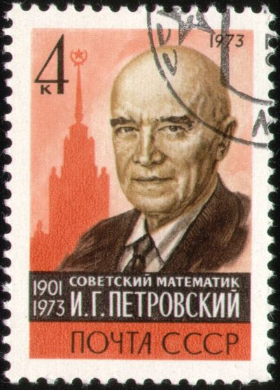 Почтовая марка СССР - Петровский Иван Георгиевич, Герой Социалистического Труда. На заднем плане — Московский государственный университет. Художник — Е. Анискин. Тираж — 3,75 млн экз.